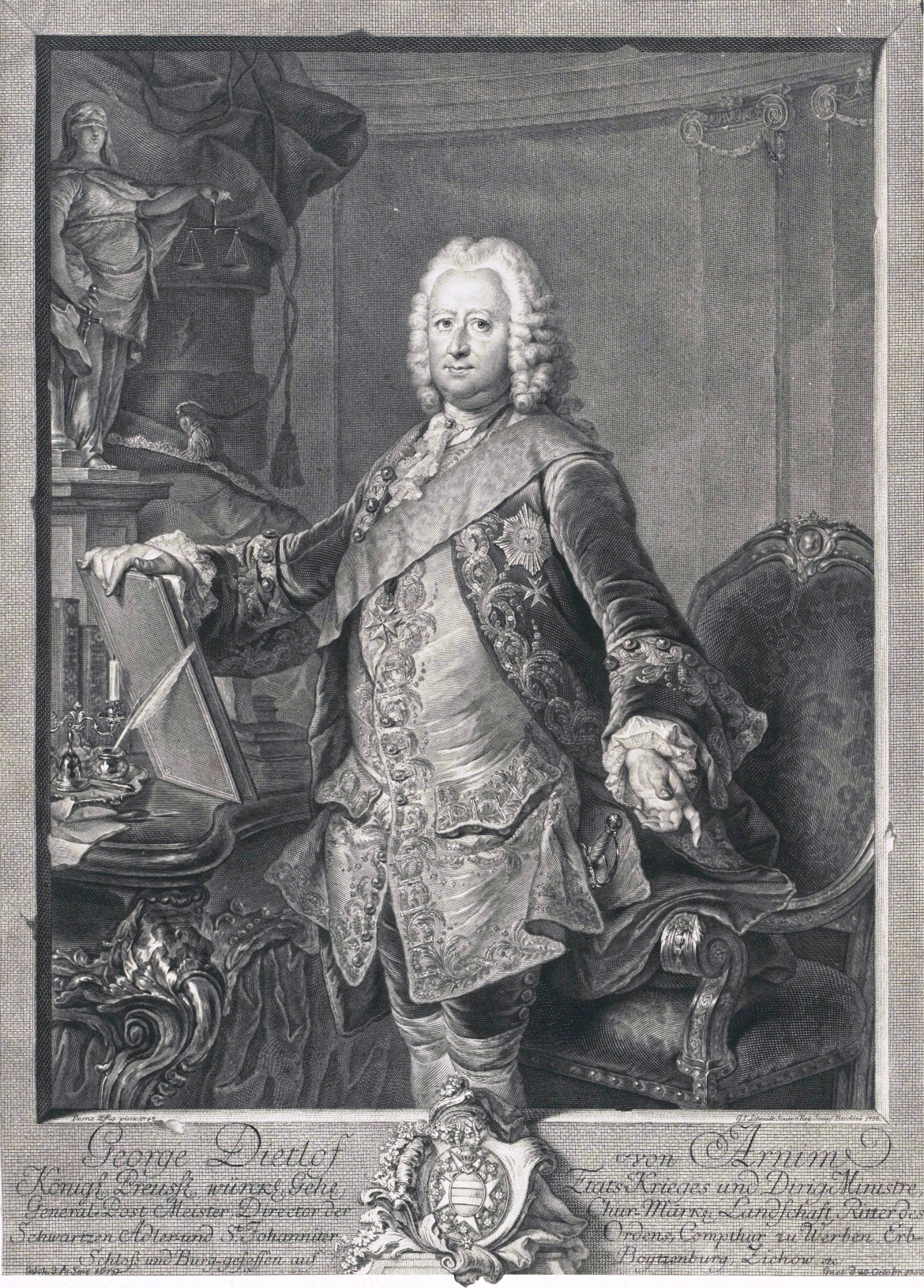 Originalbildbeschreibung: "George Dietlof von Arnim, Königl. Preuss. würckl. Geh. Etats-Krieges und Dirig: Ministre, General-PostMeister, Director der Chur-Märck: Landschaft, Ritter des Schwarzen Adler- und St. Johanniter Ordens, Compthur zu Werbem. Erb-Schloß und Burg - gesessen auf Boytenburg, Lichow etc. Gest. d. 20. Octobre 1753" Namensschreibweise der Deutschen Nationalbibliothek: Arnim, Georg Dietloff von